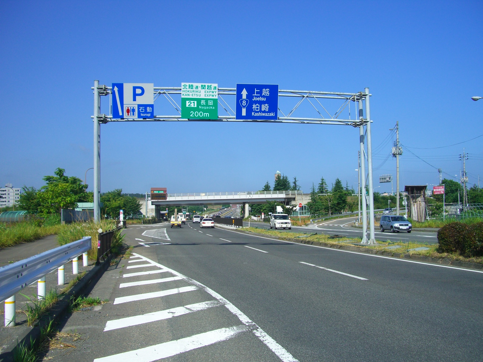 長岡市内の国道8号 関越道長岡ＩＣ手前